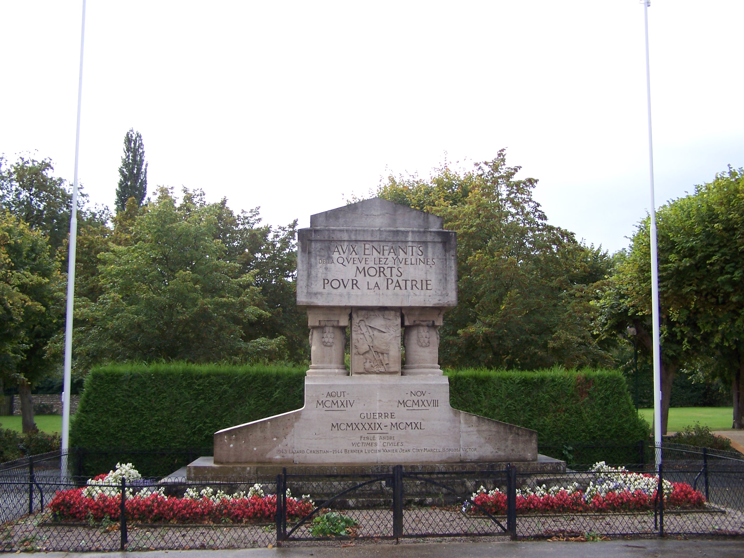 Monuments aux morts de La Queue-lez-Yvelines (Yvelines, France)